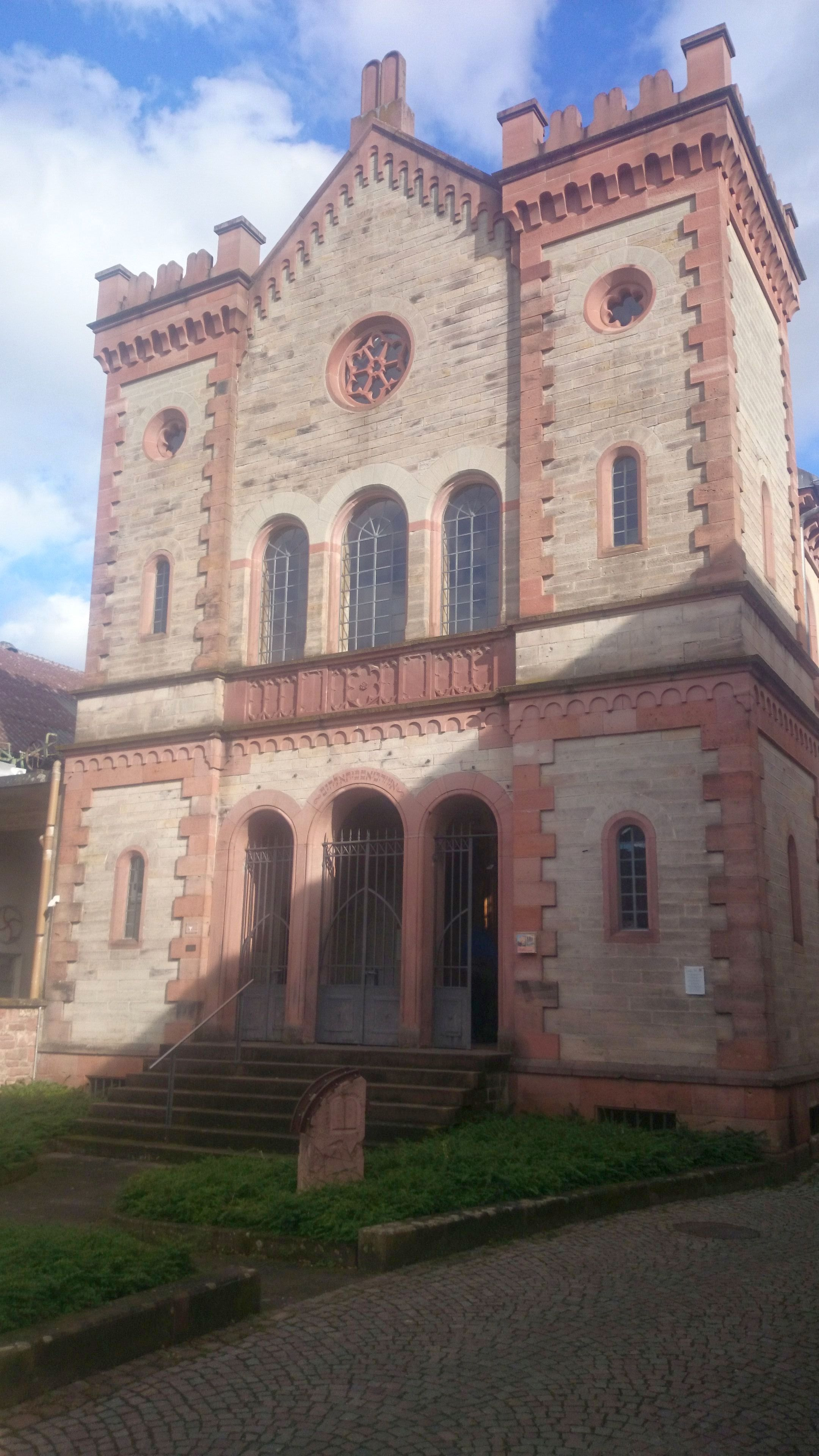 Ehemalige Synagoge Kippenheim. Es ist ein Denkmalgeschütztes Gebäude.